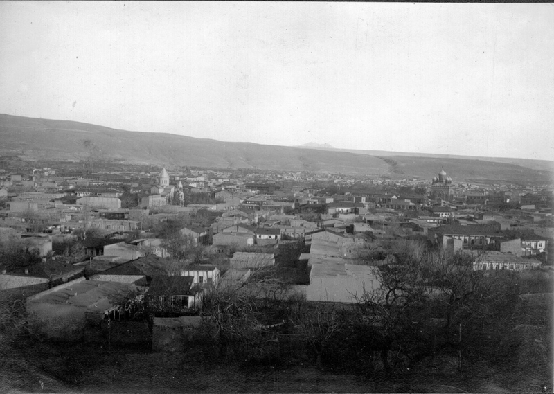 Երևանը՝ ՀԽՍՀ մայրաքաղաք